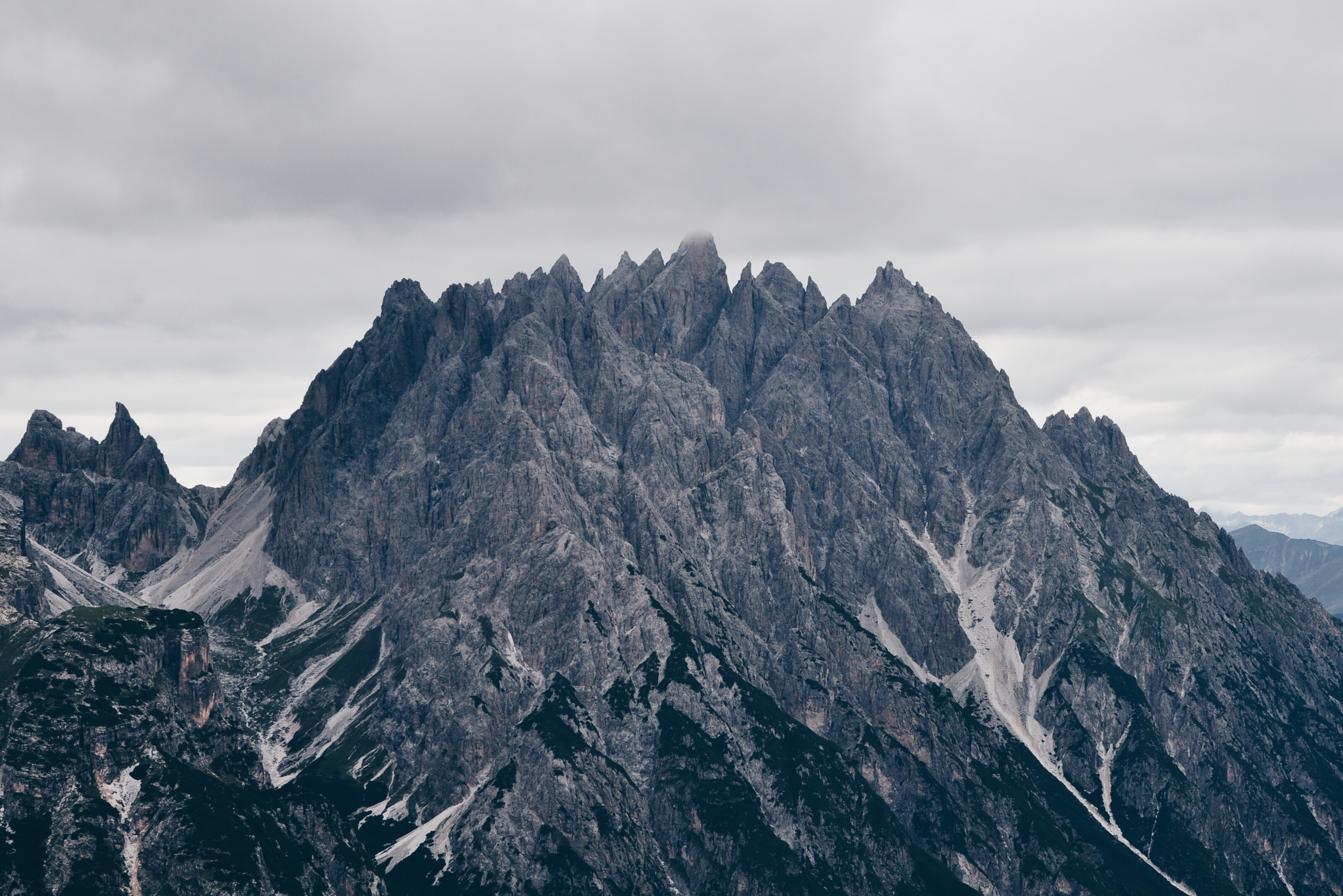 Parco naturale Tre Cime (Q1970453)